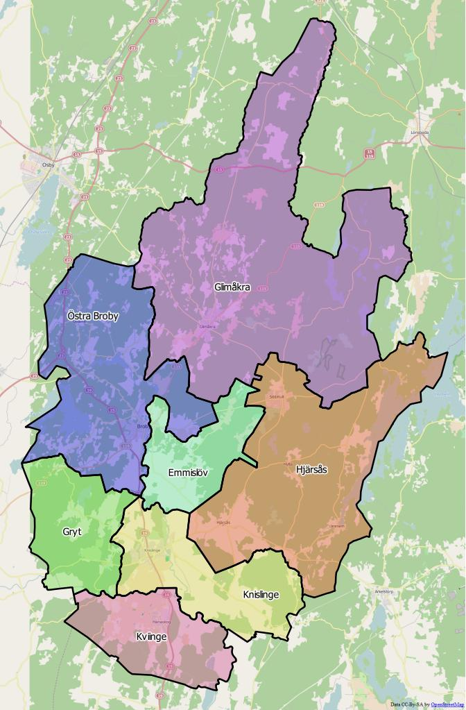 Distriktsindelningen i Östra Göinge kommun World file 68.11532898532010449 0 0 -68.11532898532010449 1552975.38063699076883495 7651113.33939357846975327